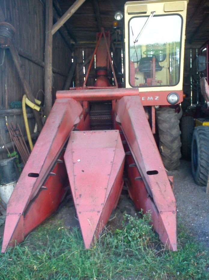 Orkan Z320 z przystawką dwurzędową